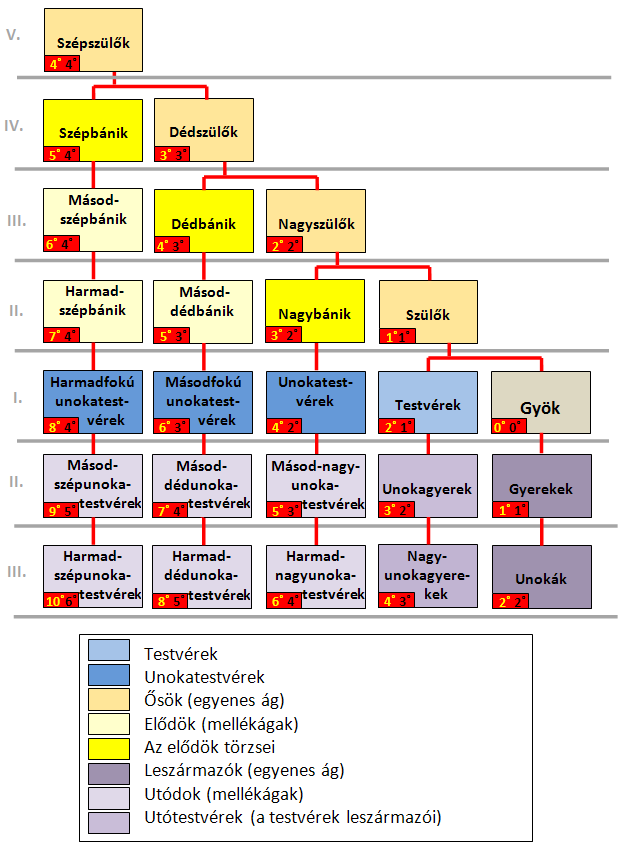 A gyök unokatestvéreinek, elődeinek és utódainak vérrokonsági alapsémája. Szegedi László, Általános genealógia. Budapest, 2015. 189. (első préselés) The genenalogical scheme of cousins, ancestors and successors by László Szegedi, Általános genealógia. (Comprehensive Genealogy) Budapest, 2015. p. 189.